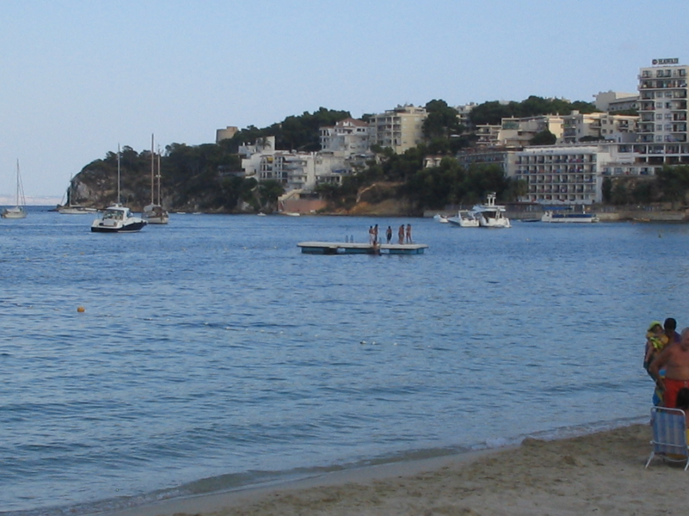 Bay of Palma Nova, Calvià, Mallorca.